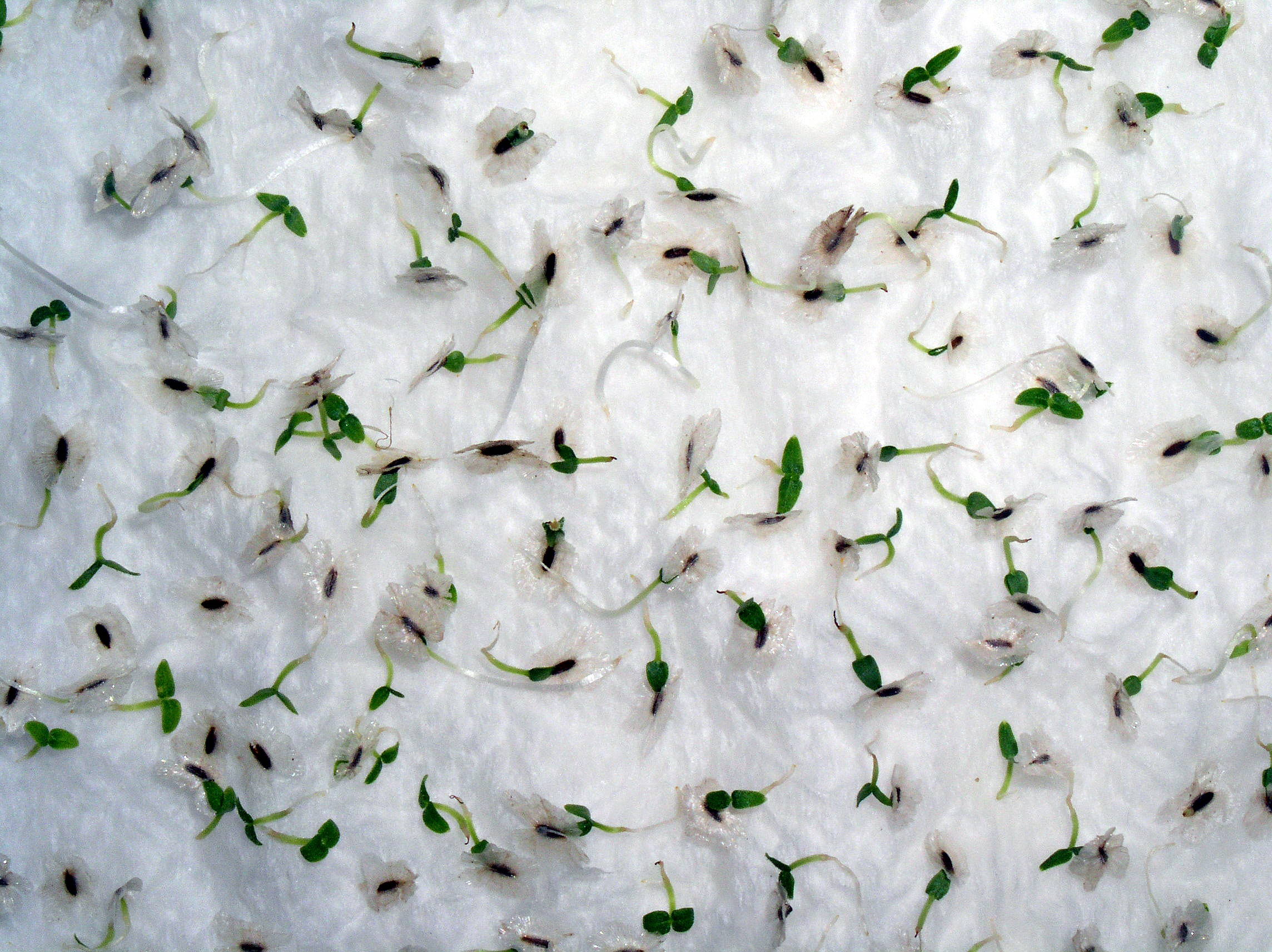 Клијање семена Paulownia fortunei (аутор: Михаило Грбић).